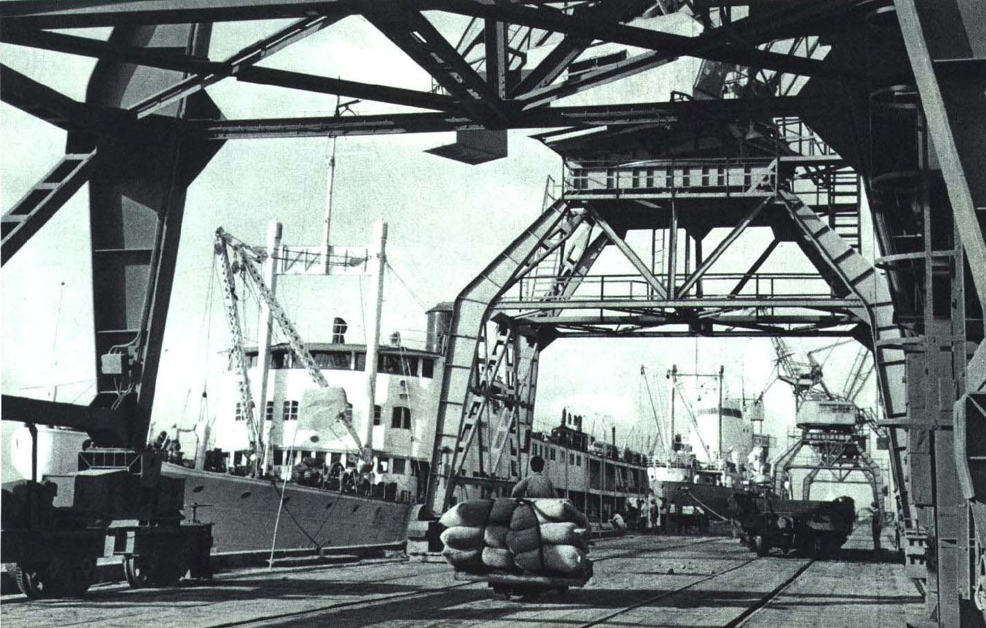 1965-3 1965年 广东湛江港